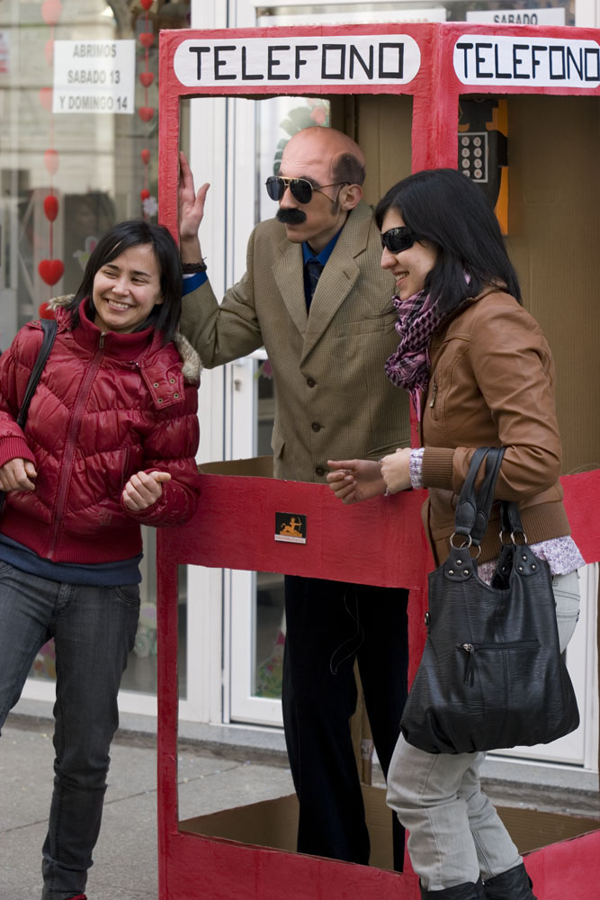 Personaje disfrazado en el Carnaval de La Bañeza, León.